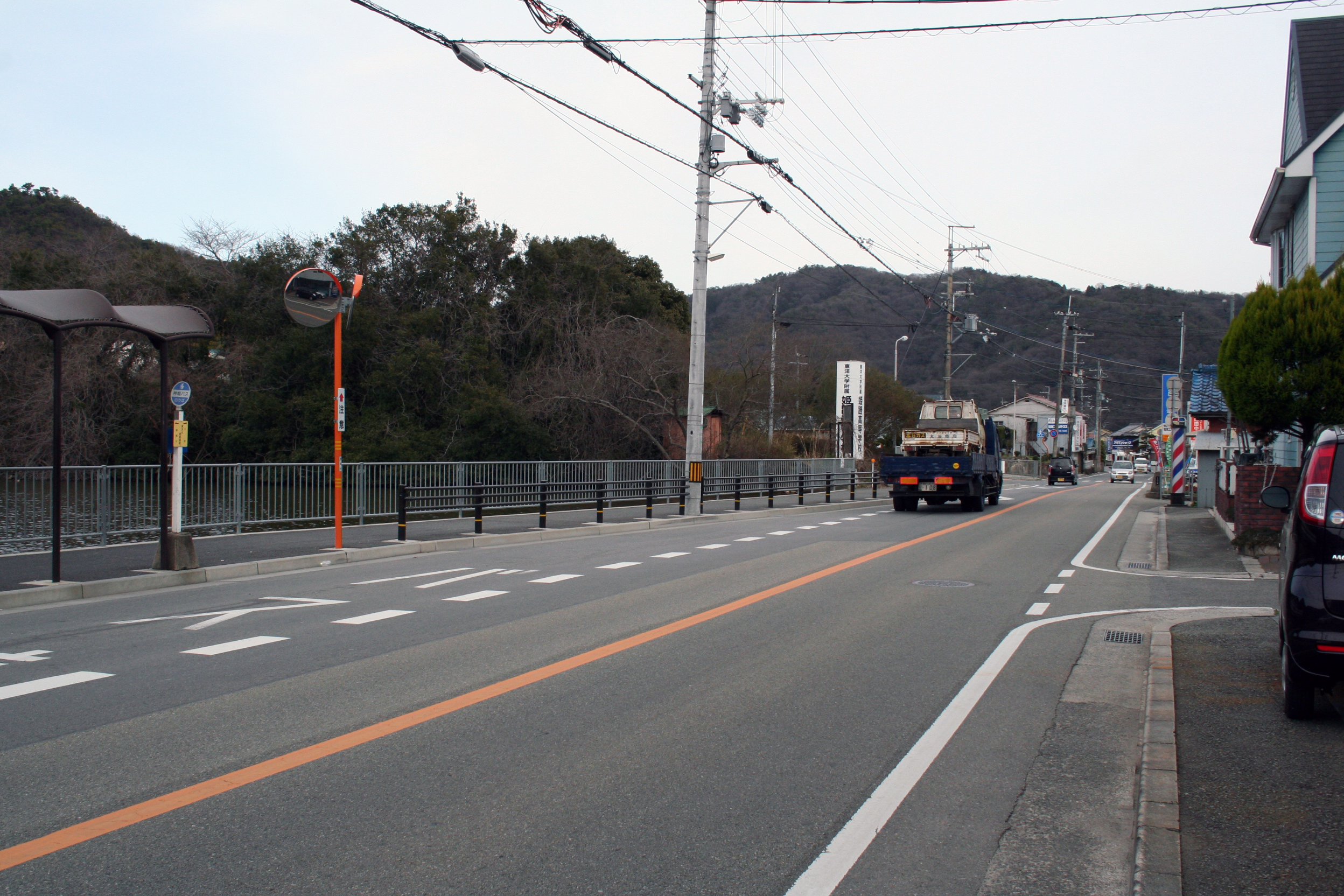 兵庫県姫路市にある私立高校「東洋大学付属姫路高等学校」。 高校の南側を通る県道545号線。